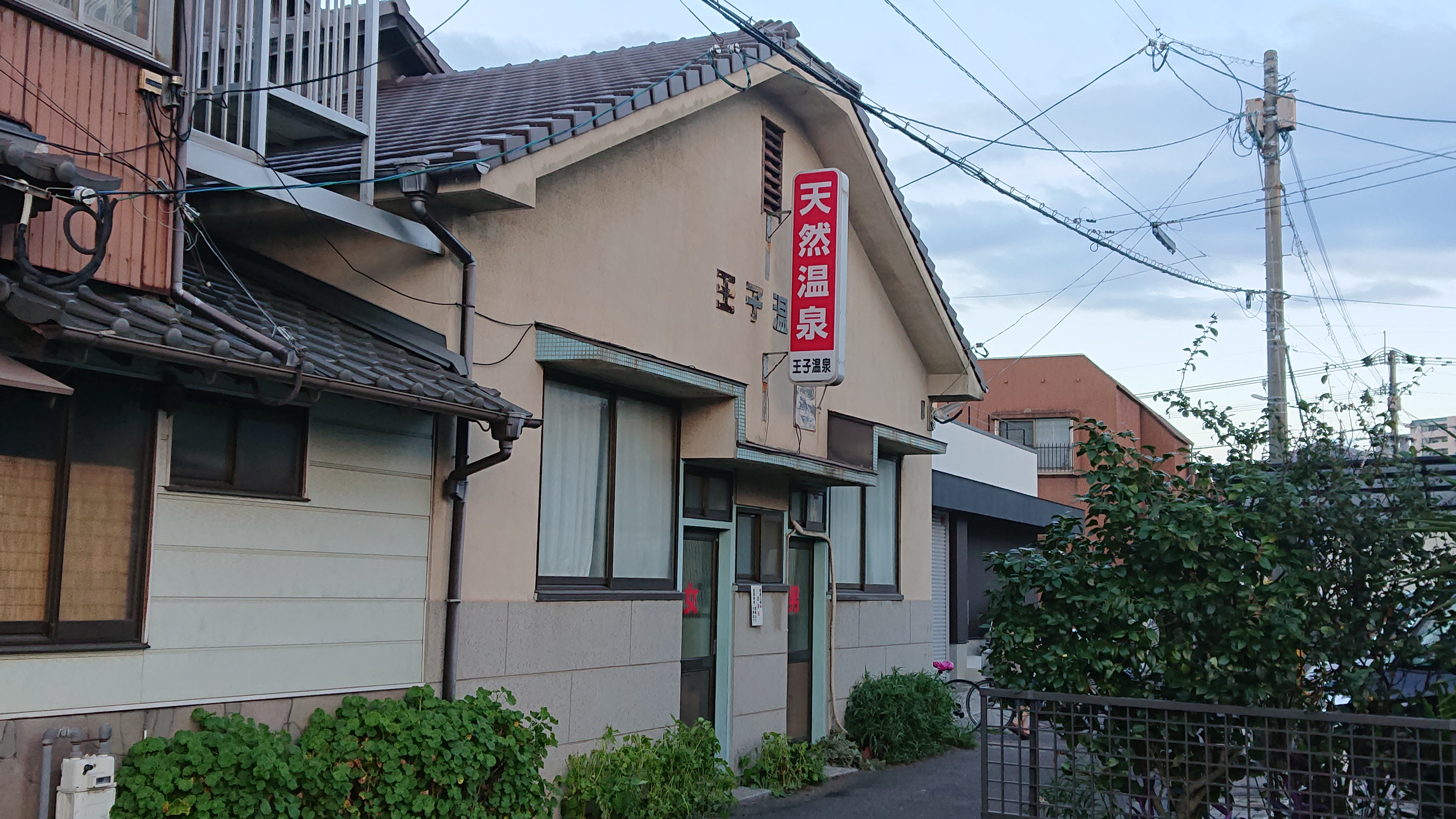 大深度地熱温泉の一つにして、大分市で最古の温泉とされる王子温泉